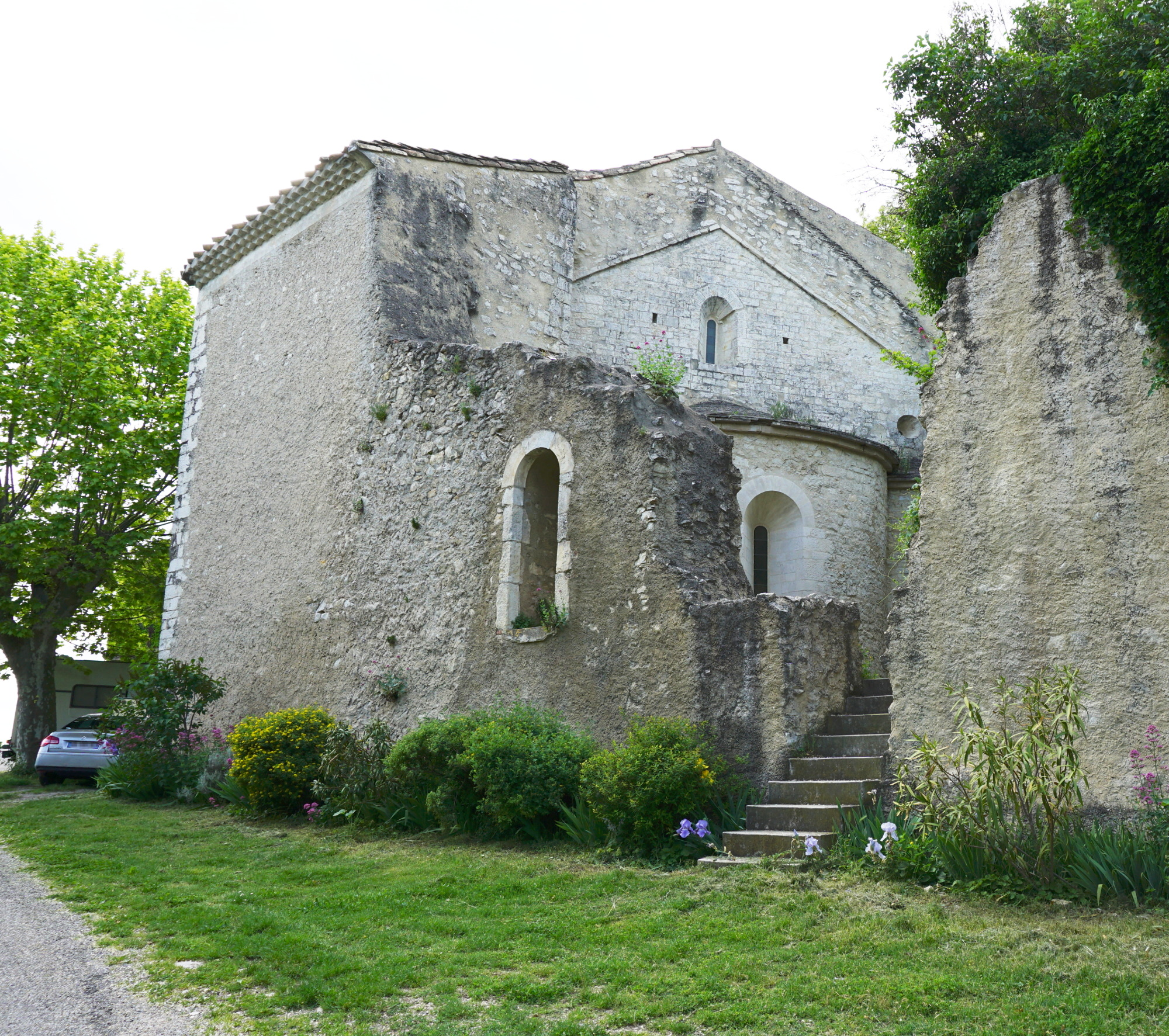 Vue arrière du chœur de Notre-Dame-la-Blanche de Savasse